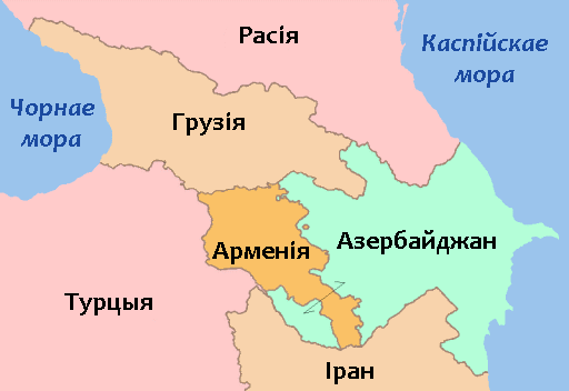 Краіны Каўказа